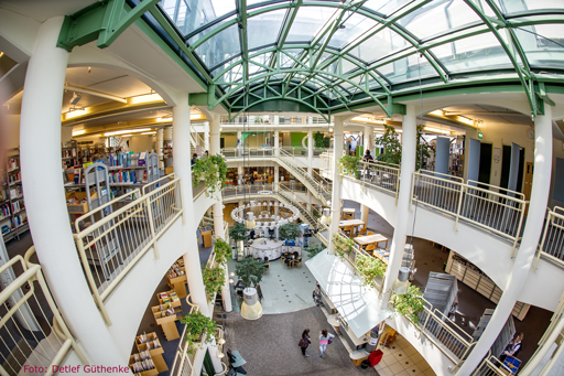 Stadtbibliothek Gütersloh Innenansicht